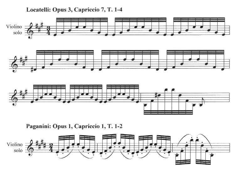 Comparison of Pietro Locatelli op. 3, Capriccio 7 and Niccolò Paganini op. 1, Capriccio 1